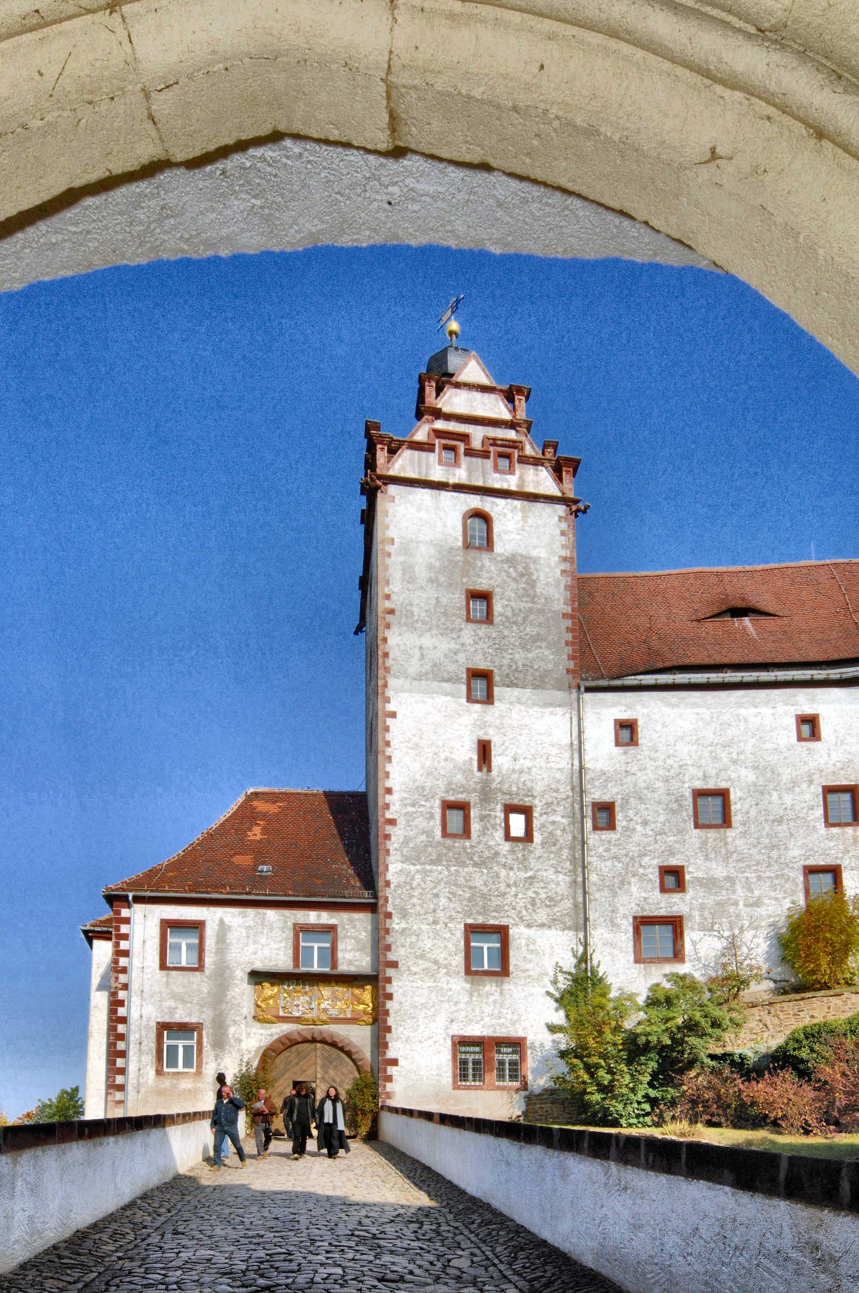 Eingang Schloss Colditz in Richtung Schlossbrücke